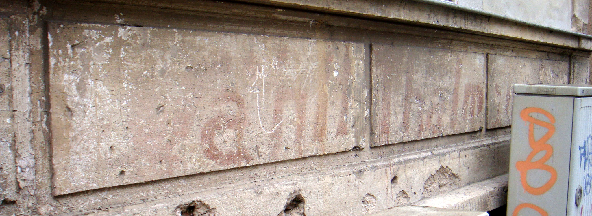 Reste einer Wahlwerbung im März 1932 für Ernst Thälmann an einer Hauswand Trierer Straße Ecke Richard-Wagner-Straße